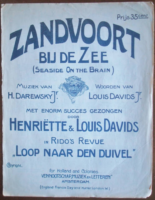 Zandvoort bij de zee tekstboek